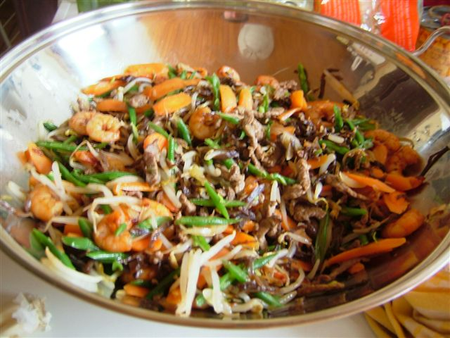 Misao, cuisine d'origine chinoise heritée par les malgaches, recette à base de nouilles, champignons émincés, gambas entières, viande émincée, carottes émincées, haricots émincés et sauce de soja